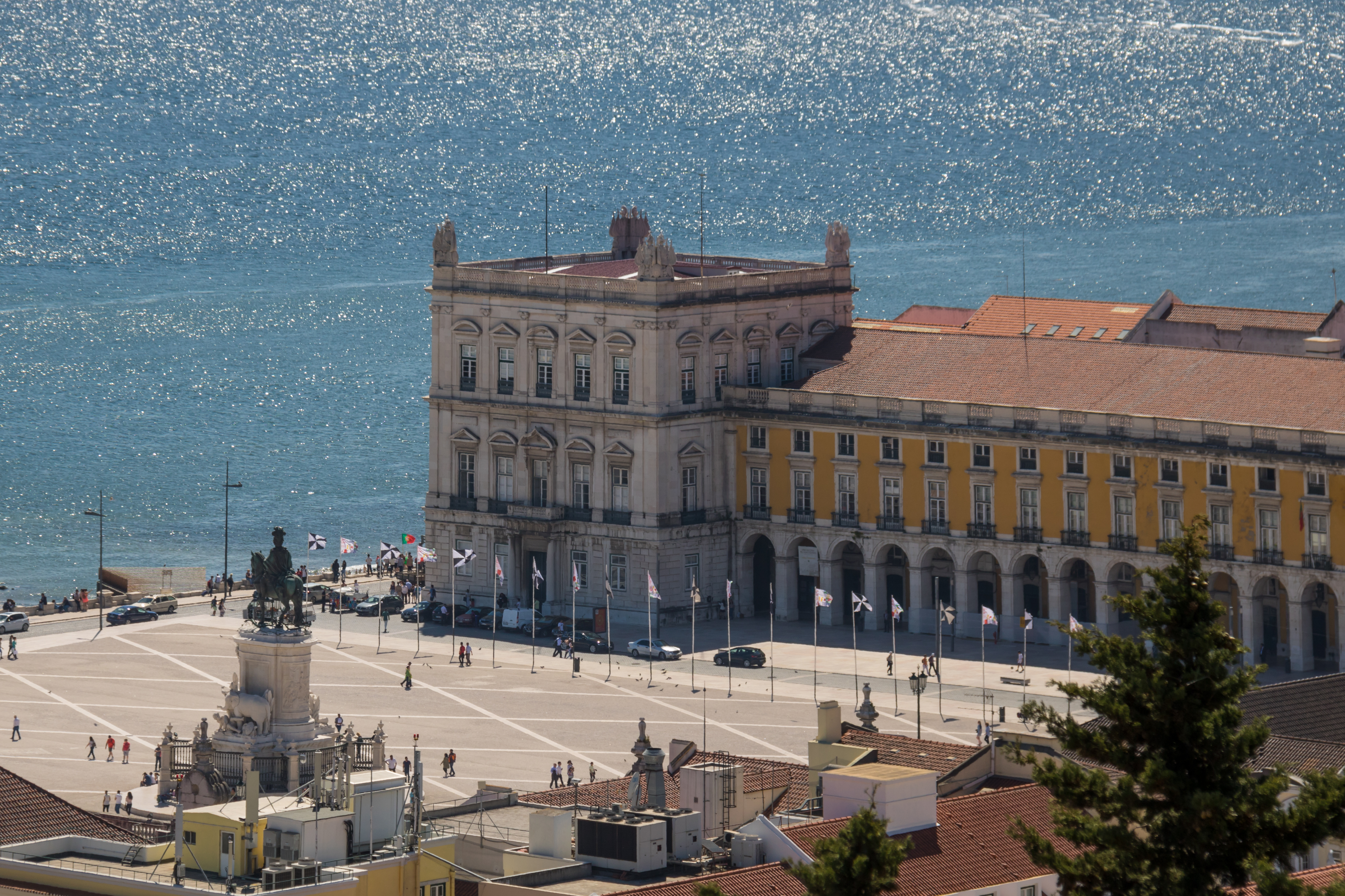 Cais das Colunas